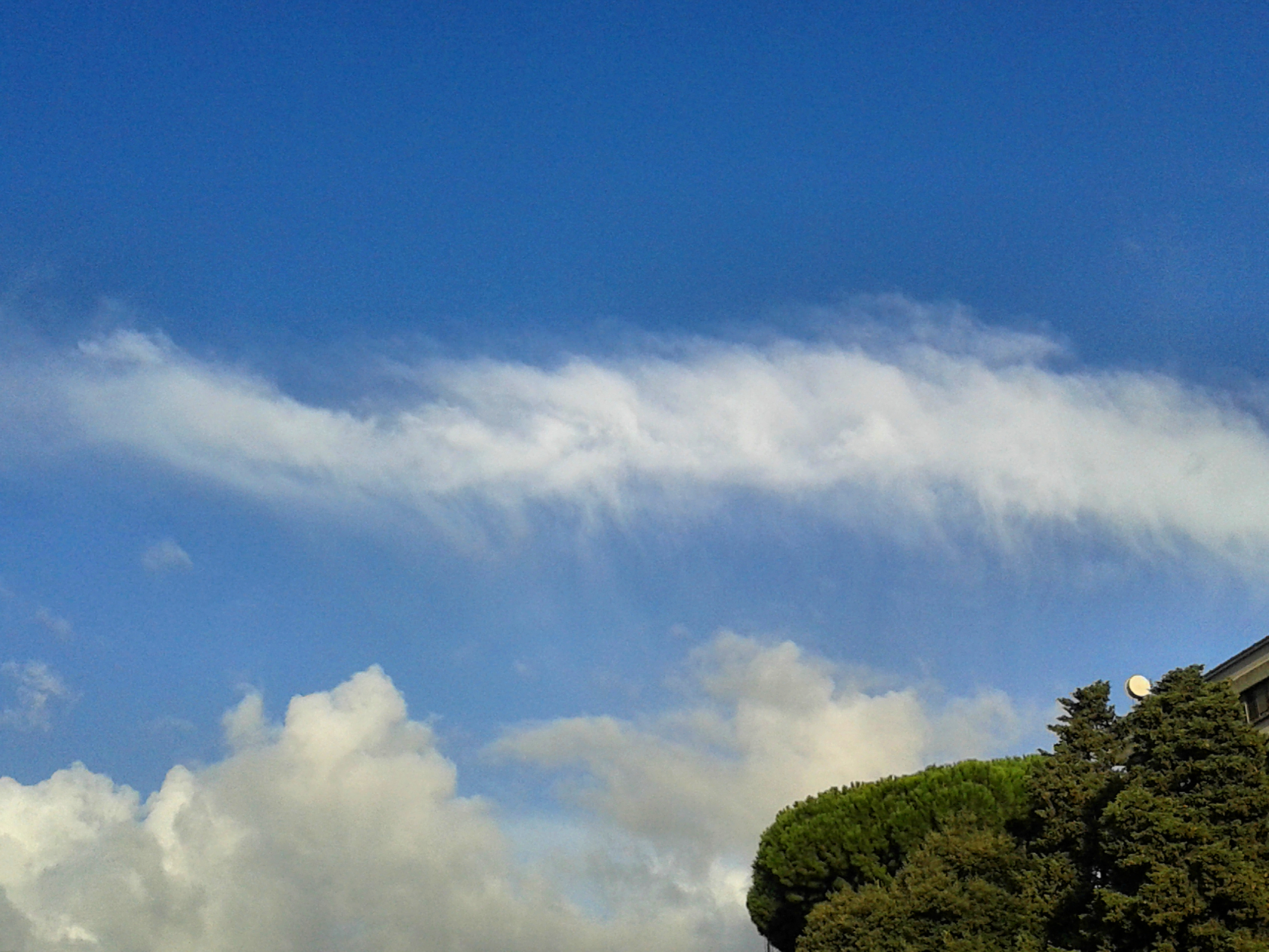 Da un piccolo Stratocumulo, probabilmente in dissolvenza, scendono precipitazioni che sublimano prima di toccare il suolo (virghe), visibili come sottili filamenti che scendono dalla nube. In basso sono visibili alcuni Cumulus congestus.